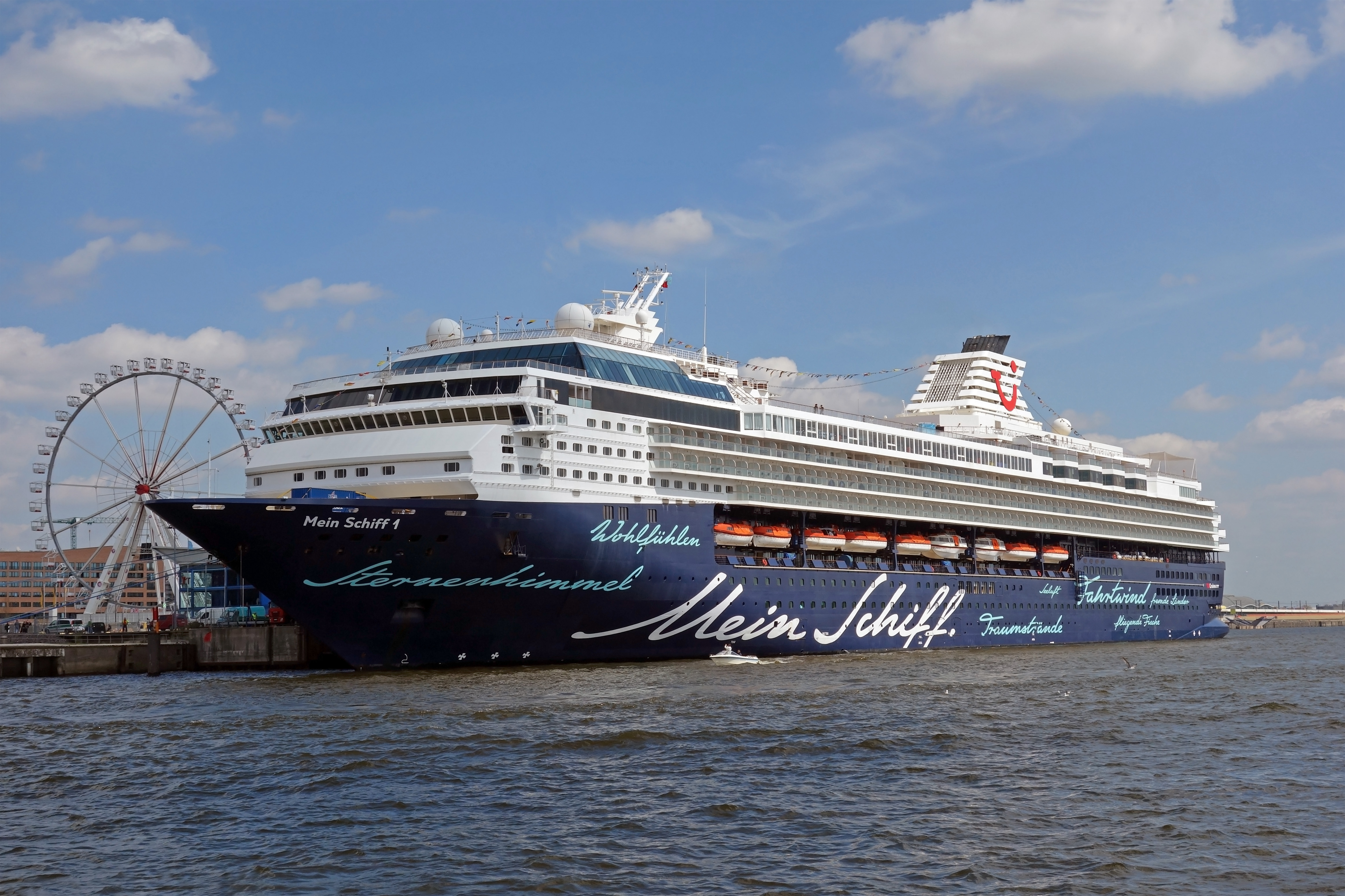 Die Mein Schiff 1 im Hamburger Hafen. Die Mein Schiff 1 lief am 25. Mai 1995 vom Stapel und bietet bei einer Länge von 263,90 m etwa 1.900 Passagieren Platz.